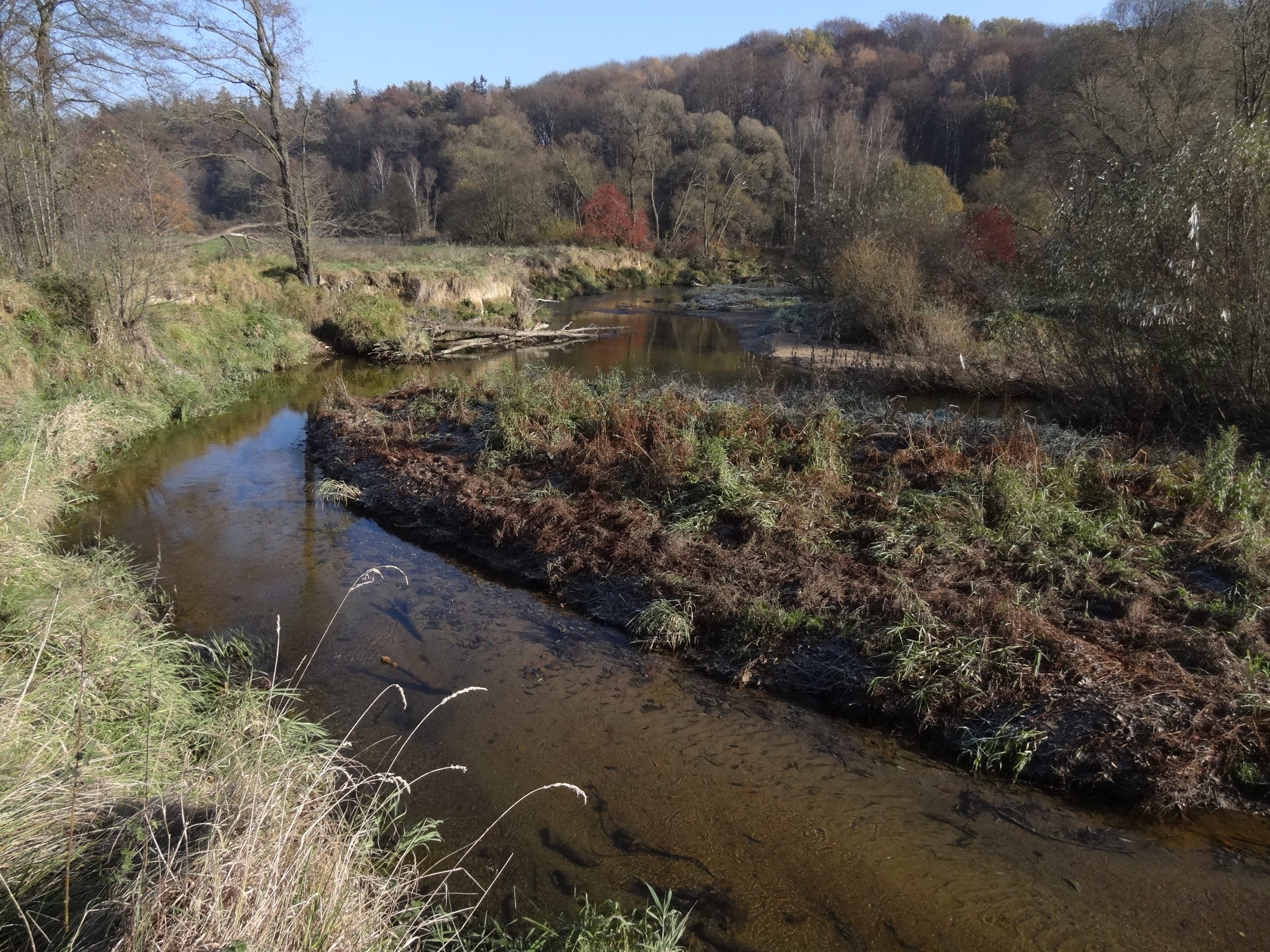 PR Meandry Smědé chrání přirozený charakter říčního koryta se společenstvy rostlin a živočichů mokřadů, říční nivy a svahového lesa.